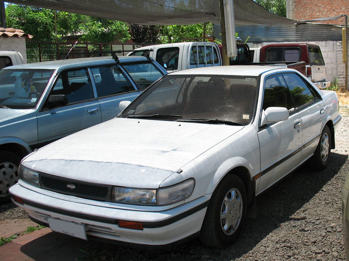 Nissan Bluebird 1.8 SSS 1989